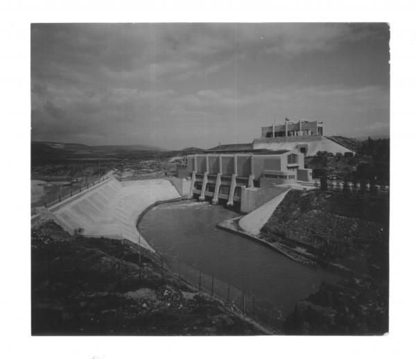 תחנת הכוח ההידרואלקטרית 'נהריים'. בנייתה הושלמה בשנת 1932. כושר ייצור 18 מגוואט חשמל